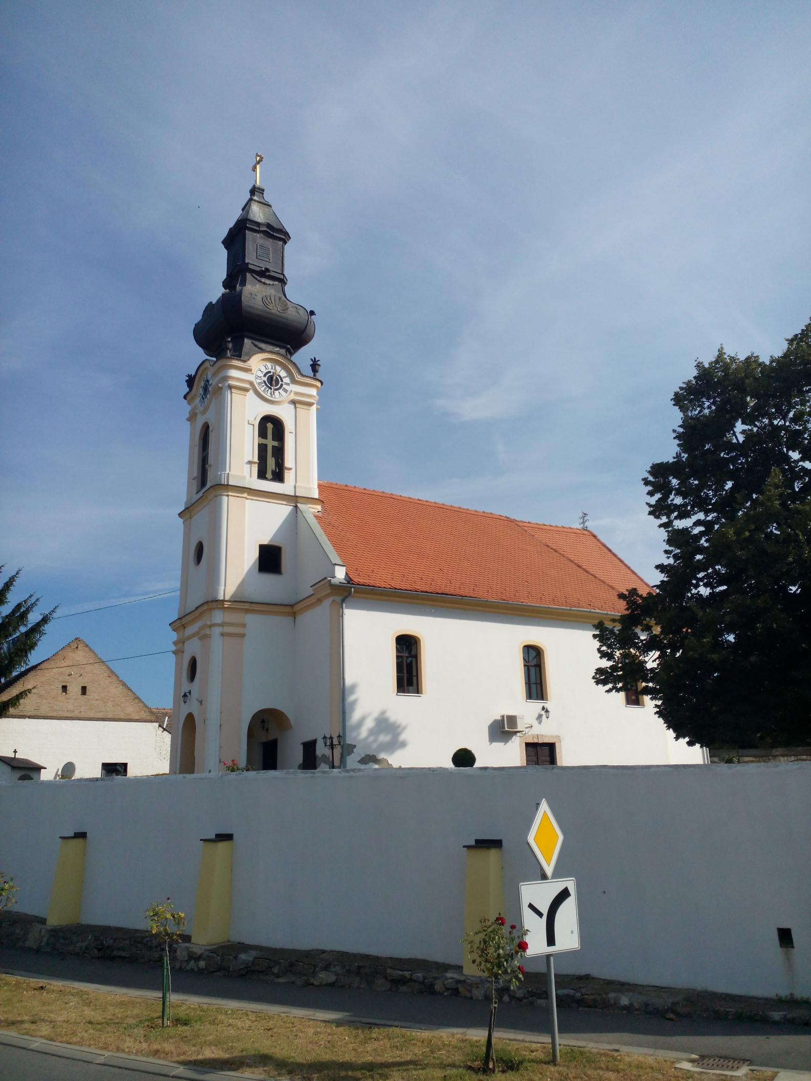 Pravoslavna crkva Prikazanja Presvete Bogorodice u Kneževim Vinogradima.